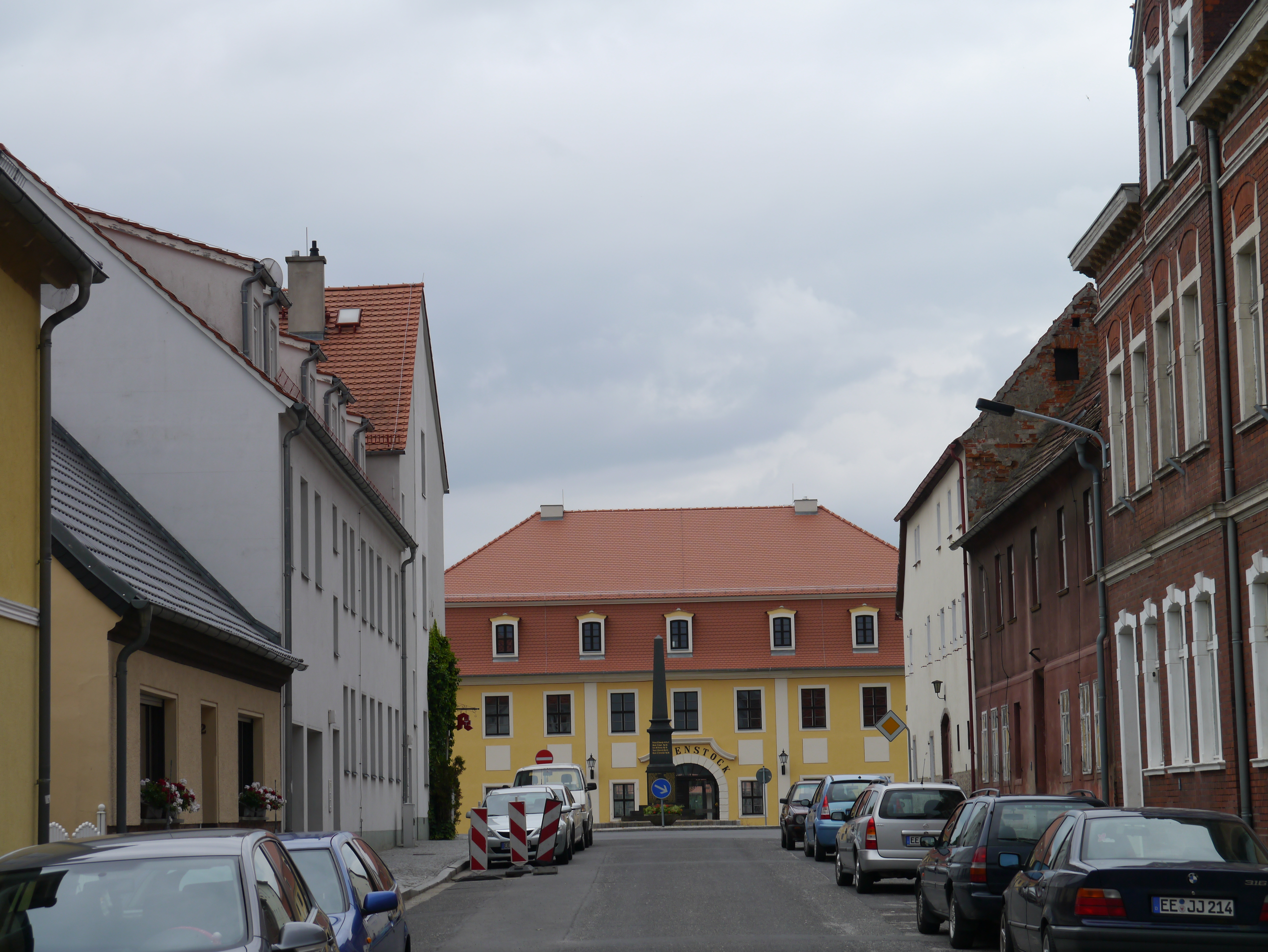 Denkmalgeschütztes Gasthaus "Rautenstock" in Doberlug-Kirchhain (OT Doberlug).